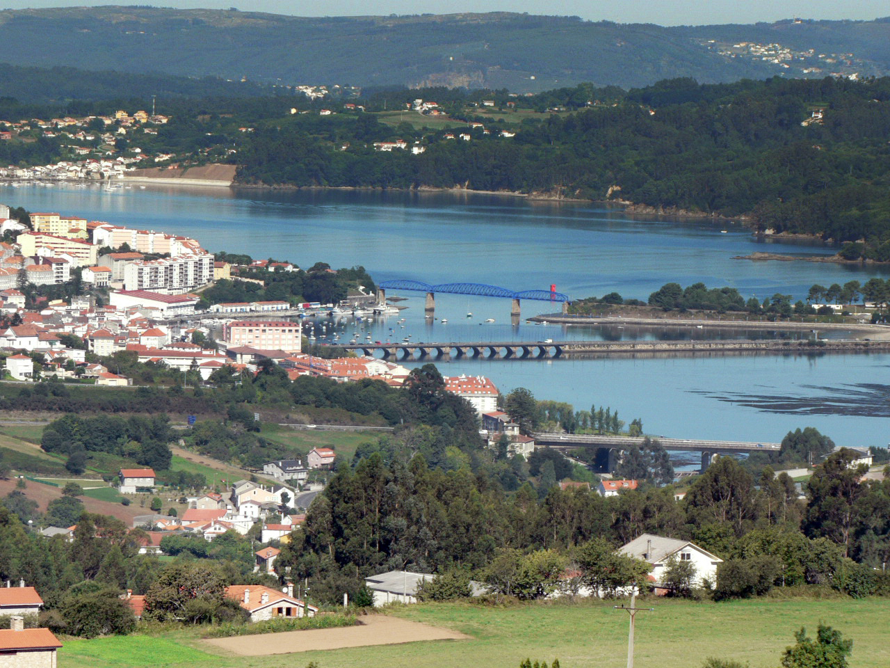 Panorámica da ria dende o castelo de Andrade. A marxe esquerda pertence ó concello de Pontedeume. A marxe dereita pertence ó concello de Cabanas